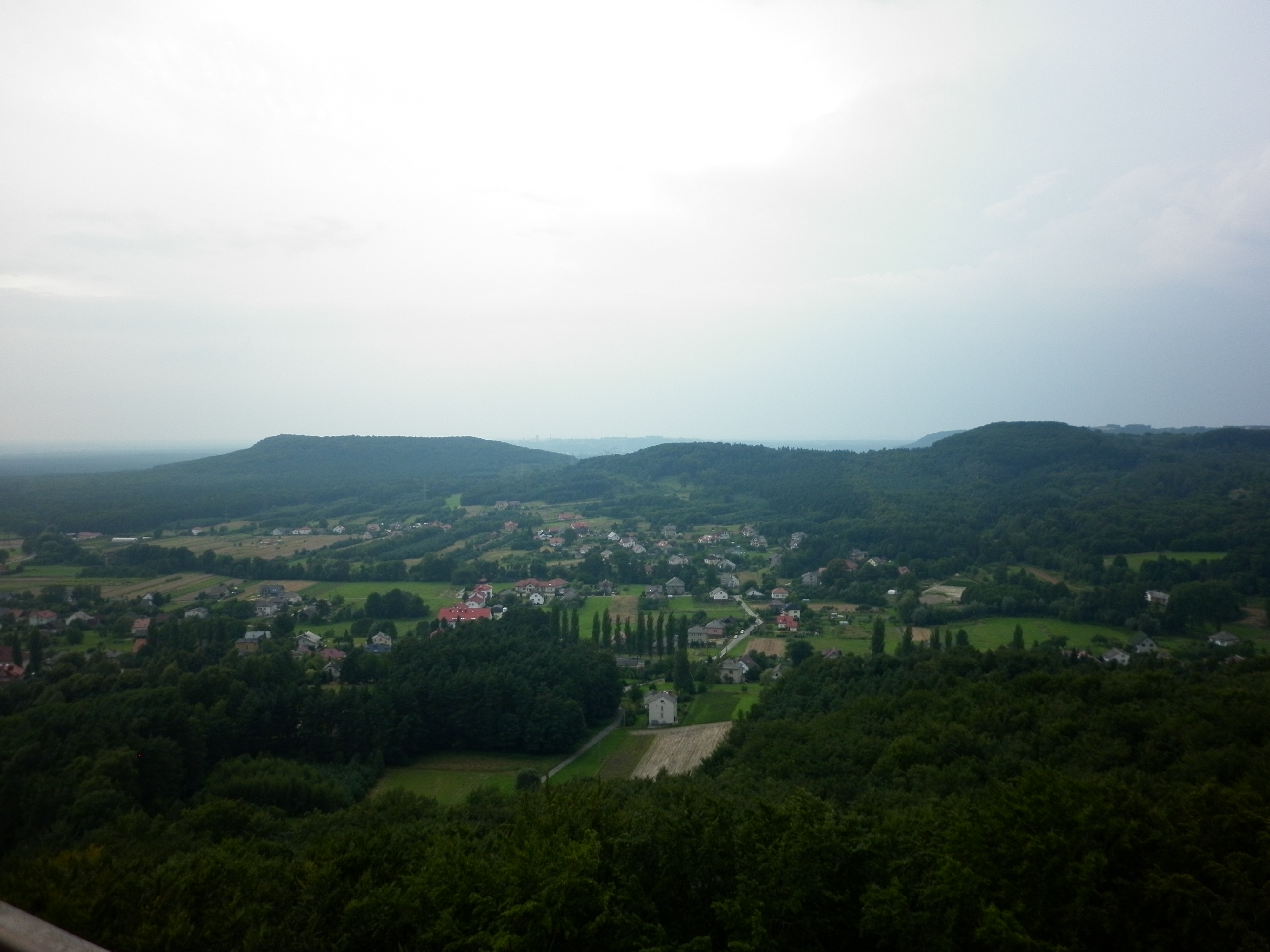 Widok na Zagórze z "gorów"